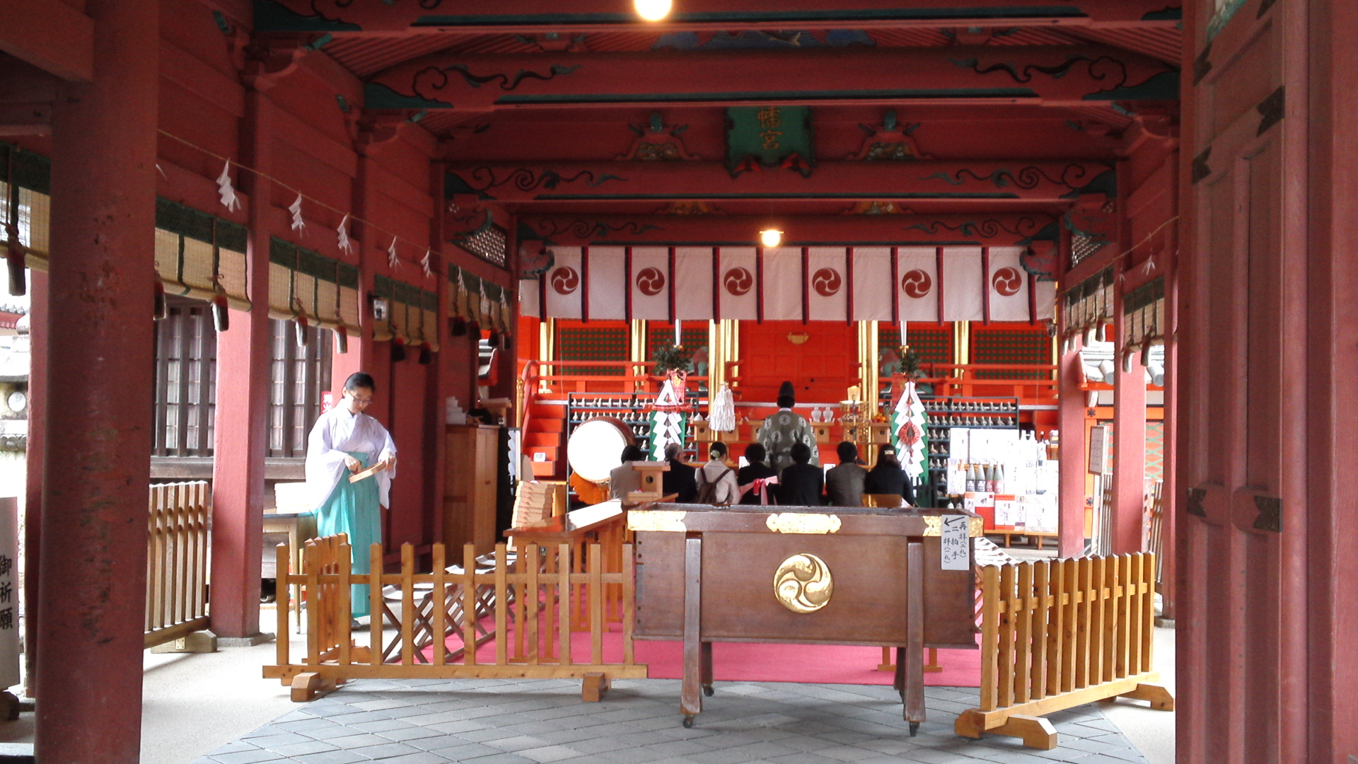 伊佐爾波神社本館